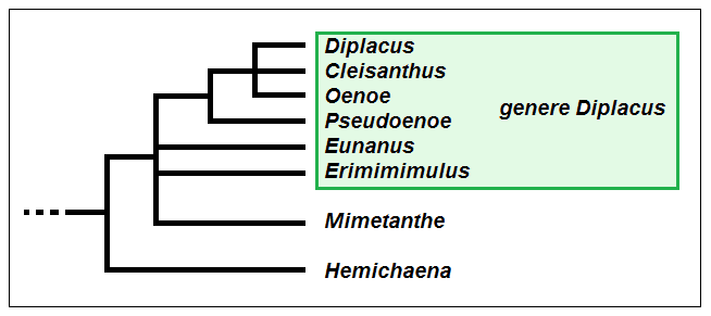 Mimuleae - Cladogramma della tribù